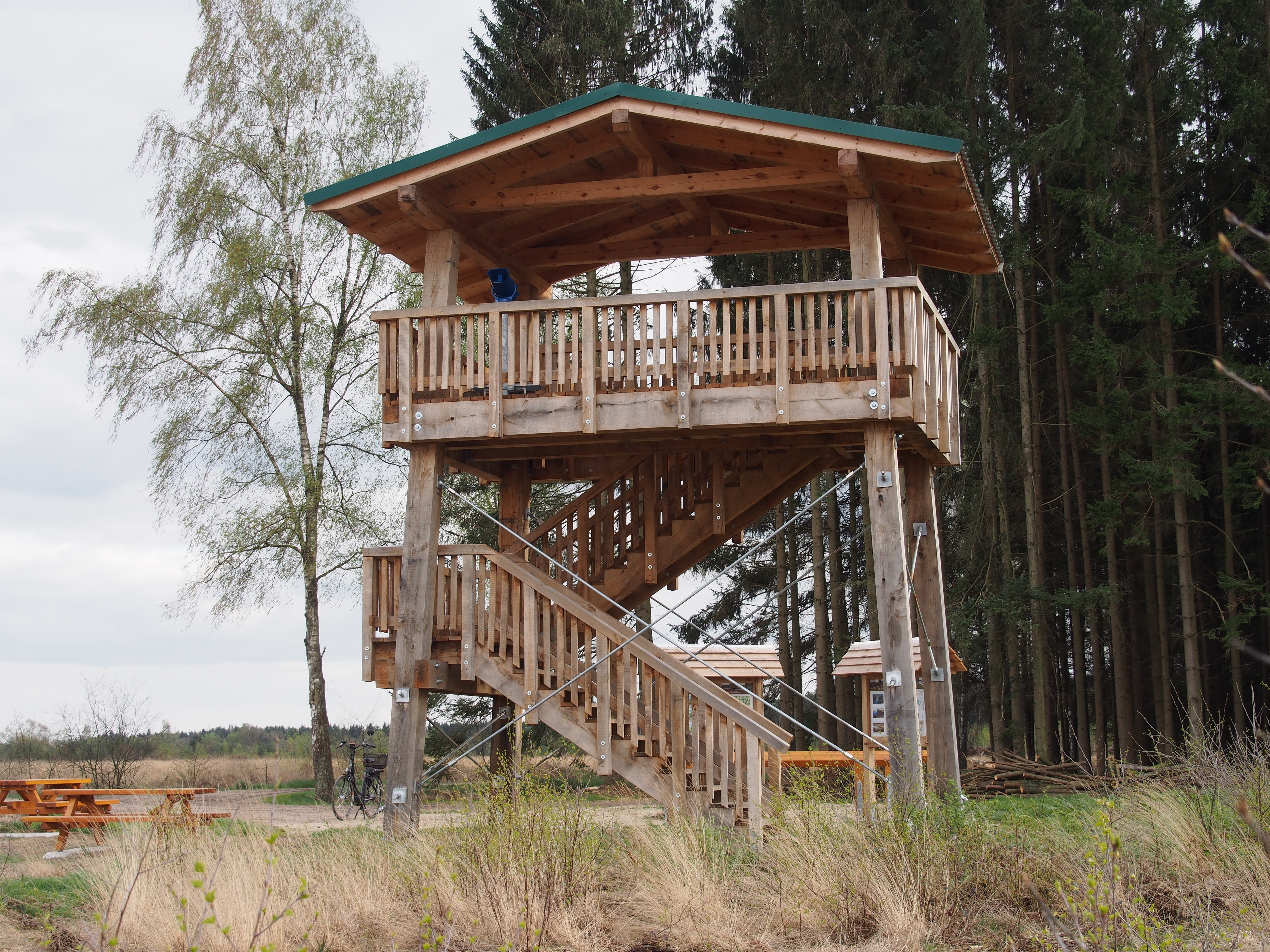 Aussichtsturm im Südosten des Großen Moors bei Becklingen